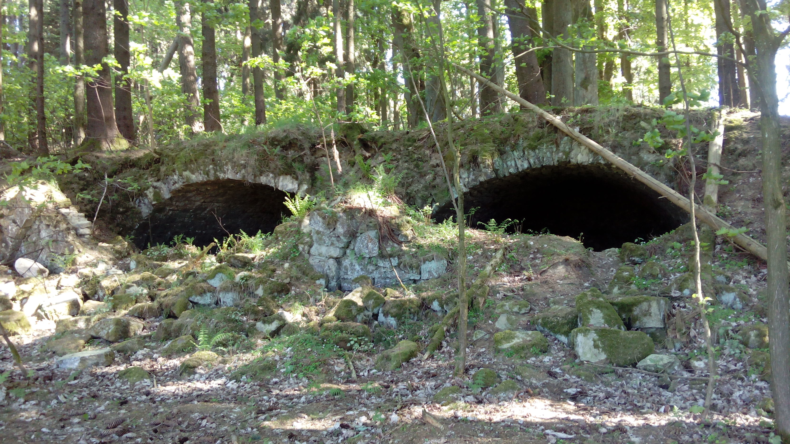 Zříceniny osady Zahájí u obce Lesná.